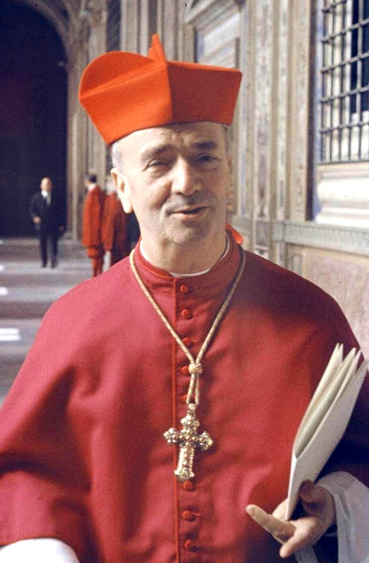 Il cardinale Alfredo Ottaviani